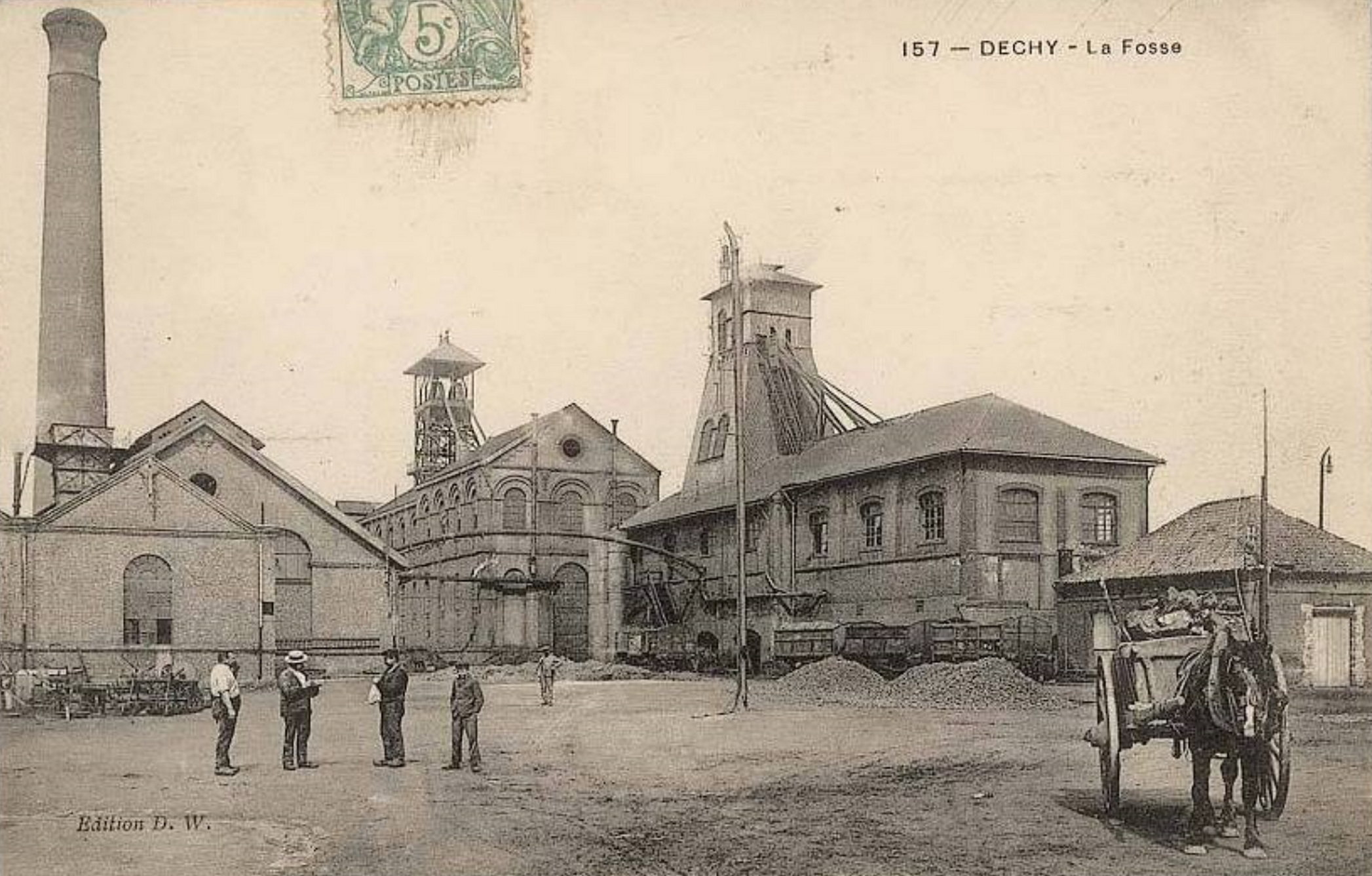 La Fosse Dechy de la Compagnie des mines d'Aniche était un charbonnage constitué de deux puits situé à Dechy, Nord, Nord-Pas-de-Calais, France.